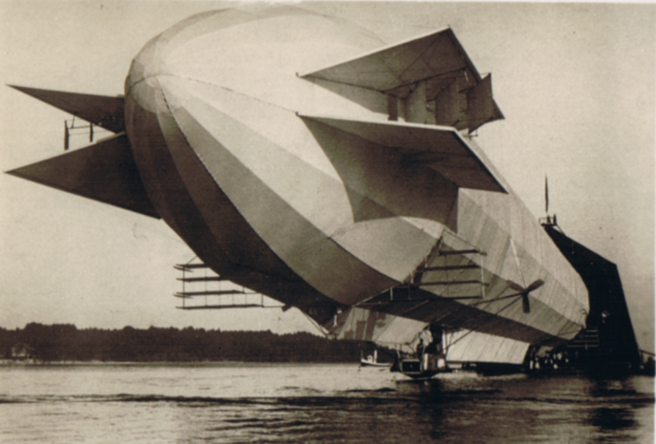 LZ 3 in Jahr 1906 (später Z 1)